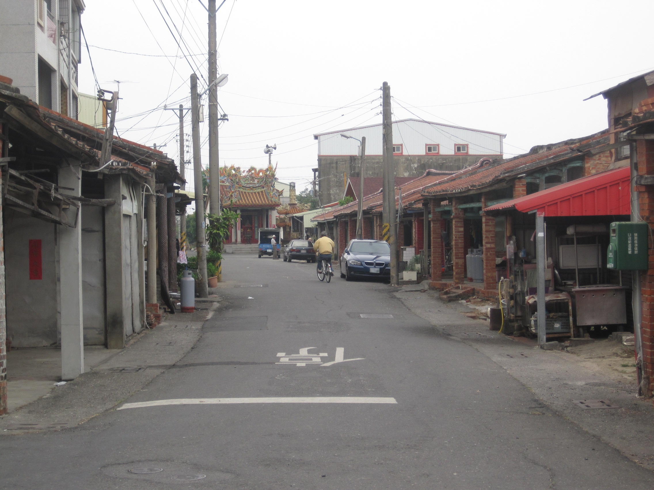 臺南市新營區鐵線里的鐵線橋老街